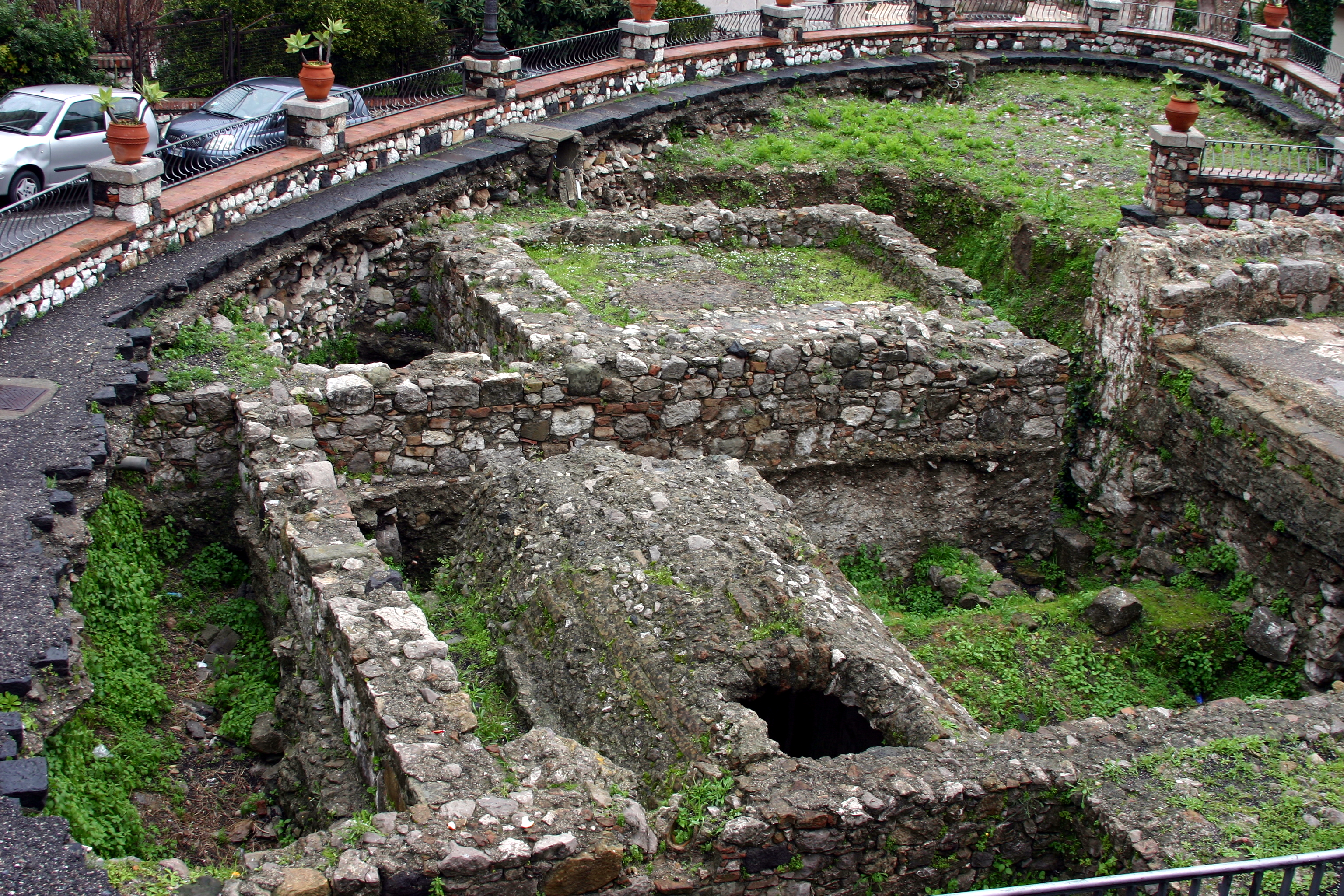 Taormina